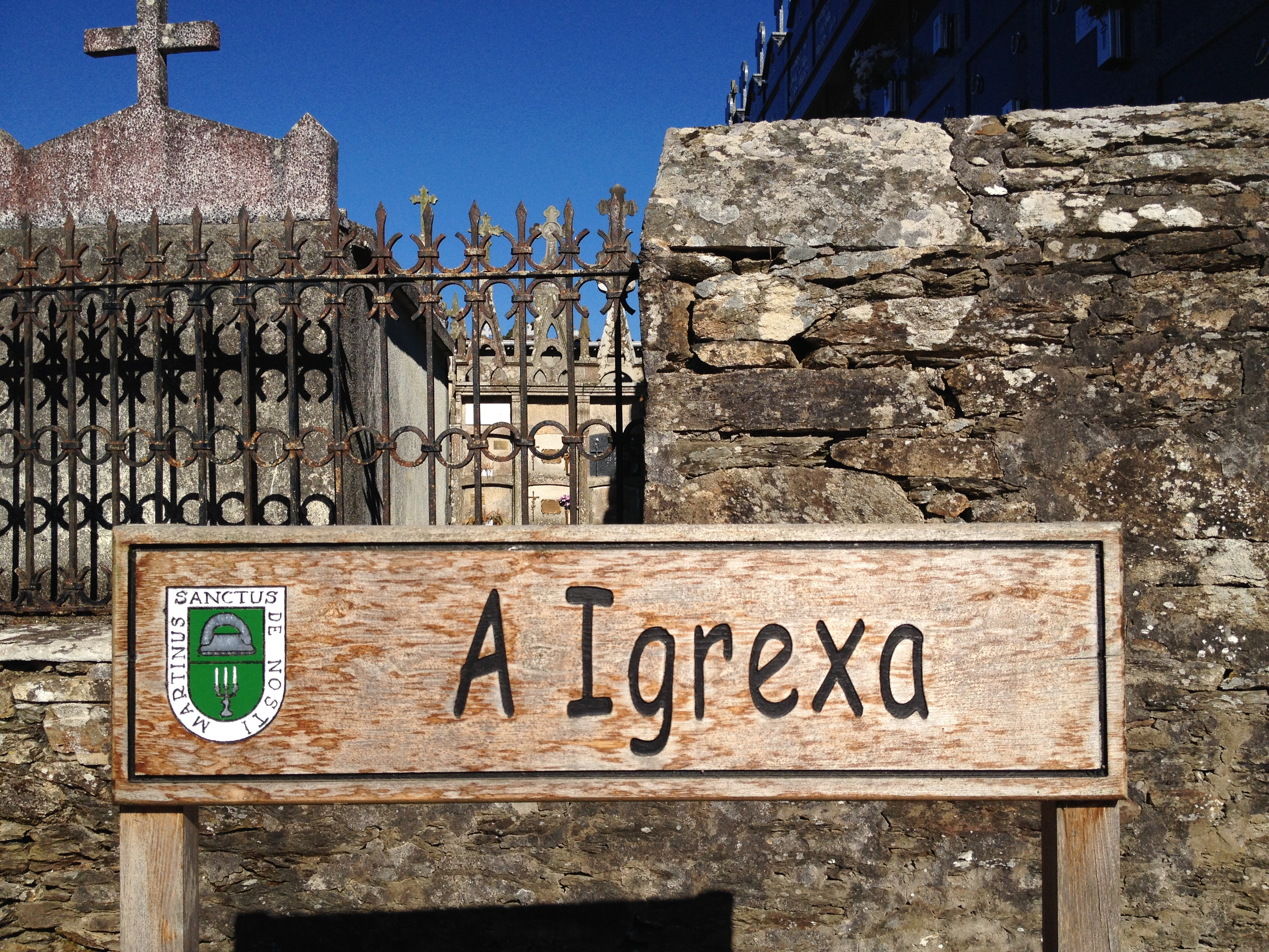 Lugar da Igrexa, Noche, Vilalba.